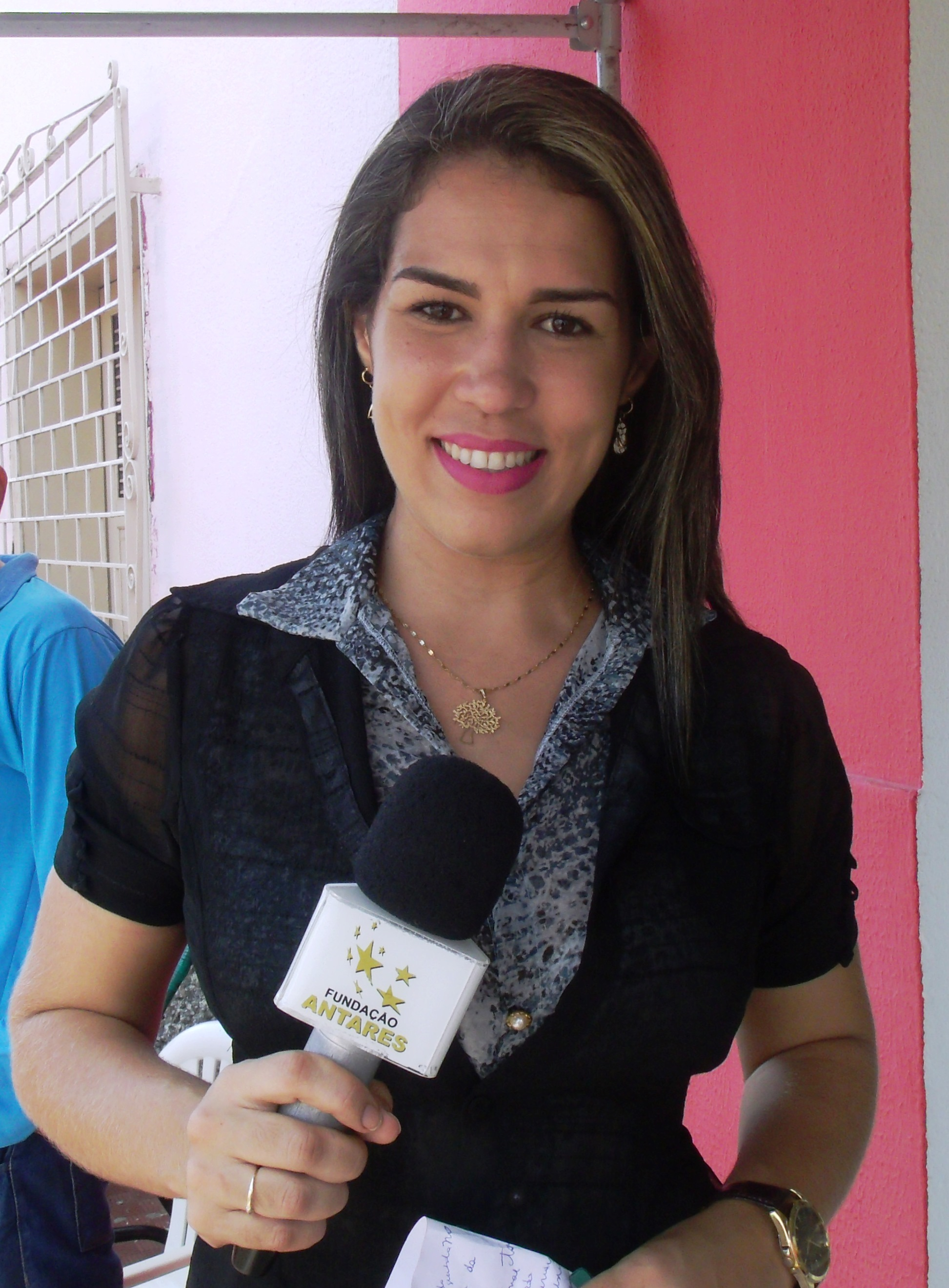 Repórter da TV Antares e Tv Brasil na cobertura do revesamento da tocha olímpica no Piauí.